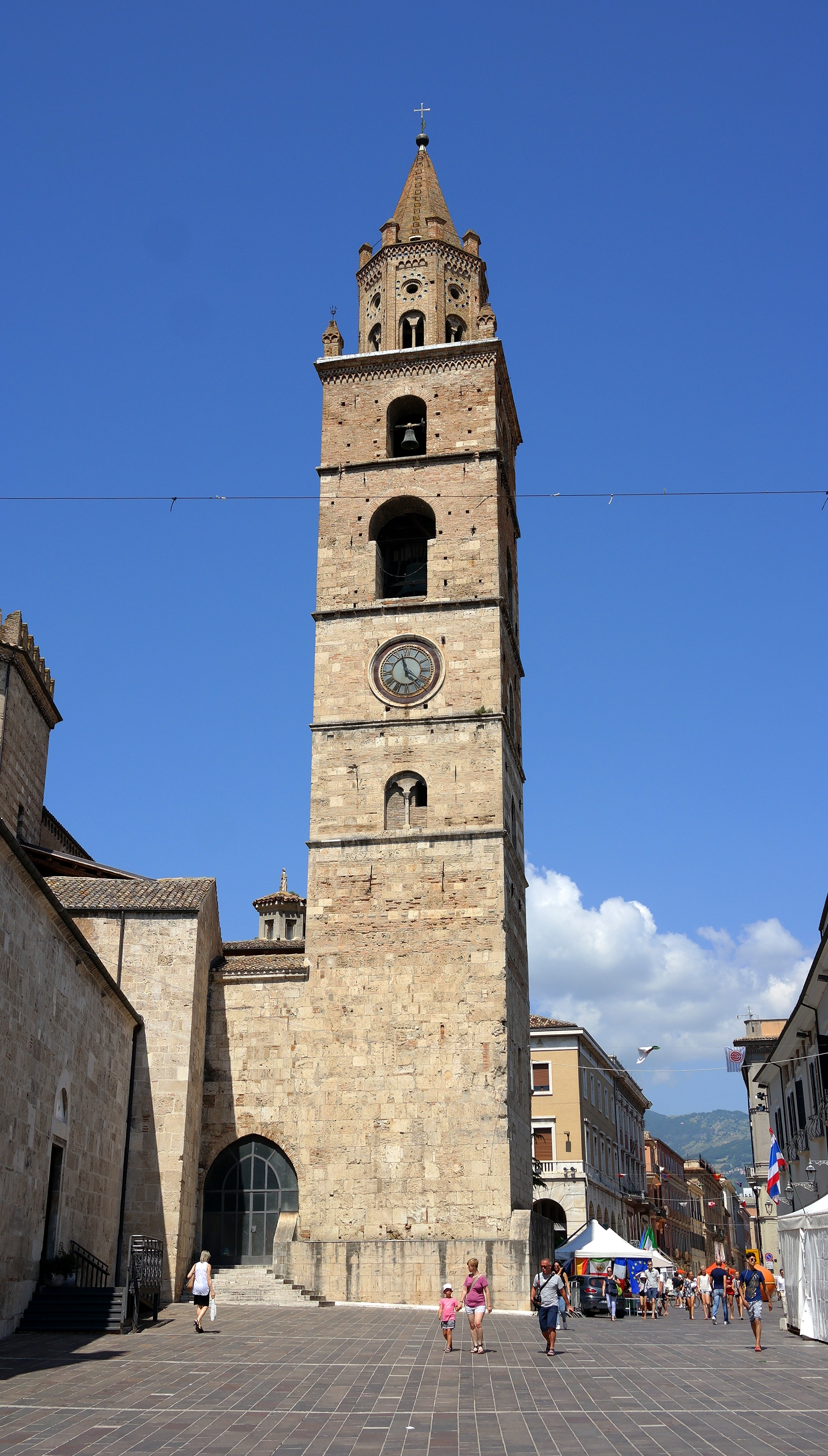 Campanile del Duomo di Teramo